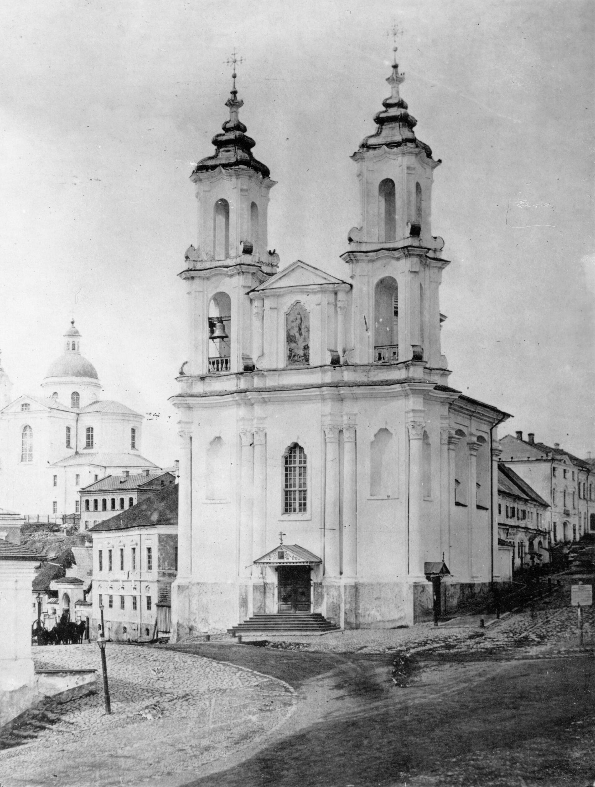 Беларуская (тарашкевіца): Віцебск (Viciebsk), рог пляцу Рынку (plac Rynak) і вуліцы Ўзгорскай (vulica Ŭzhorskaja). Рынкавая царква Ўваскрасеньня Хрыстова